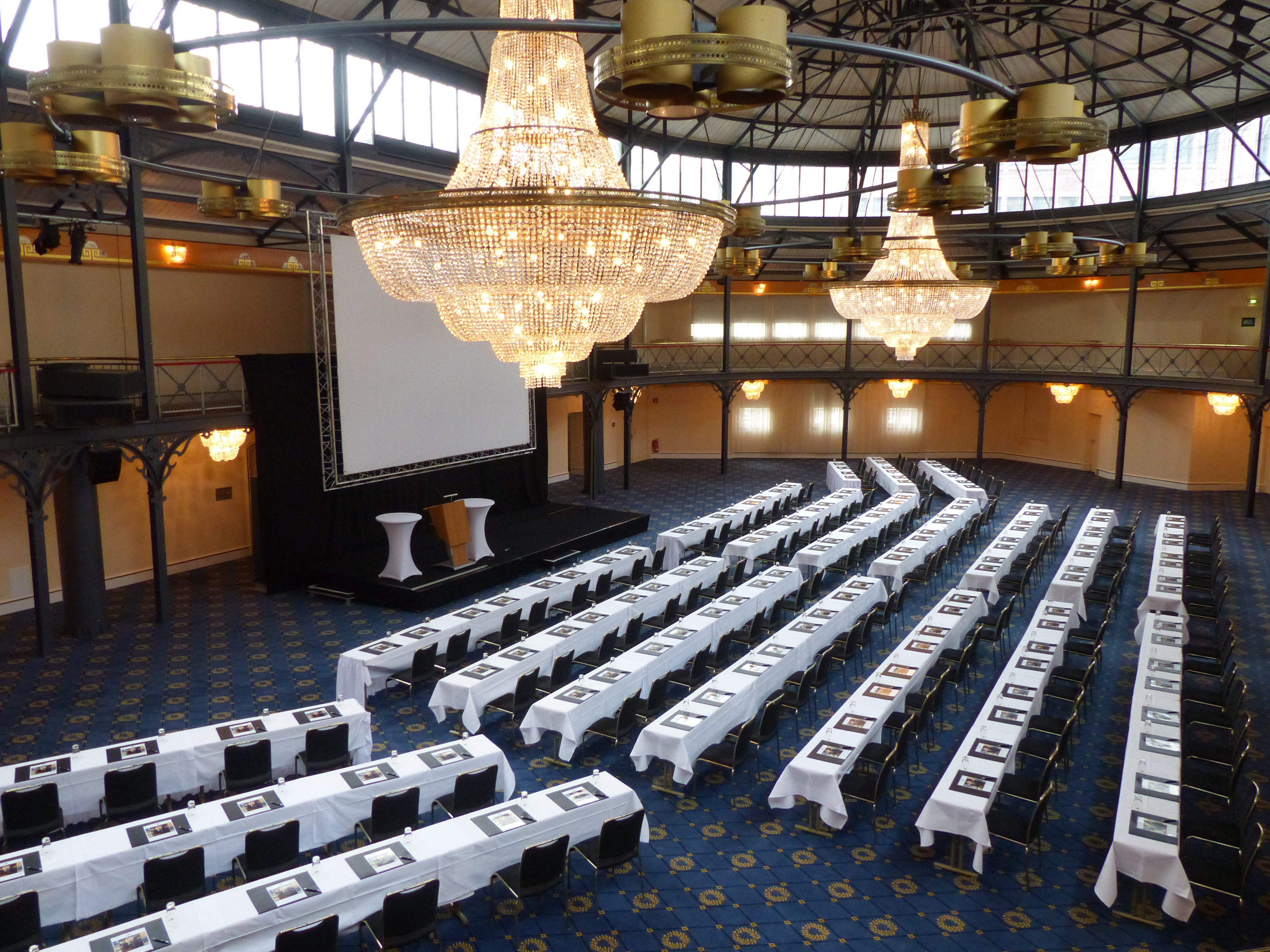 Parlamentarische Bestuhlung in der Reithalle